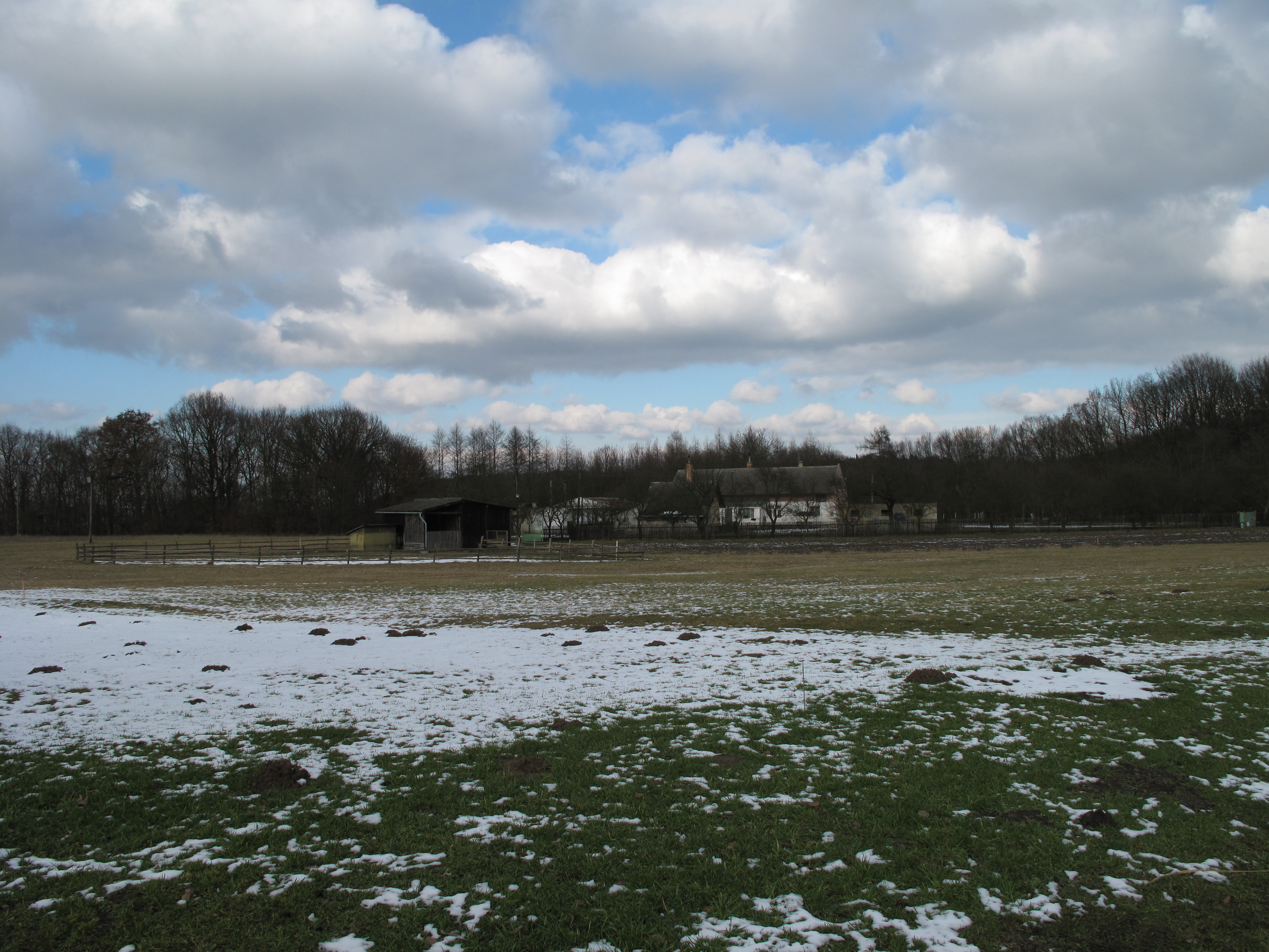 Louka v Kladěrubech. Okres Mladá Boleslav, Česká republika.